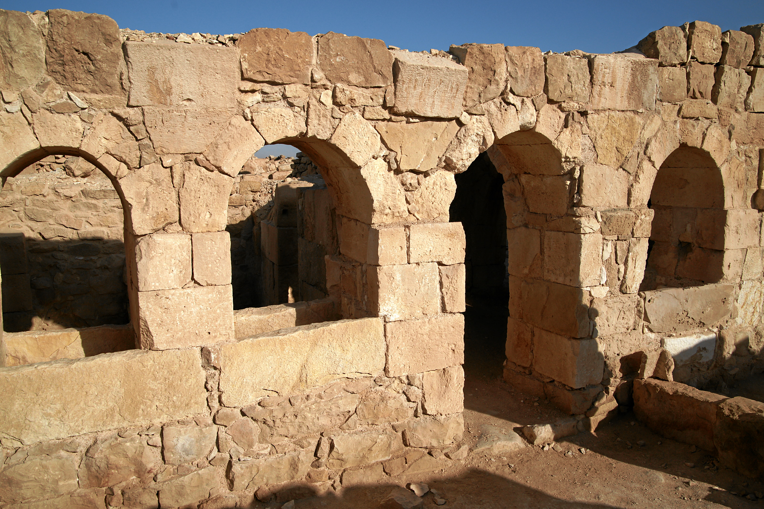 Shivta: Stallgebäude